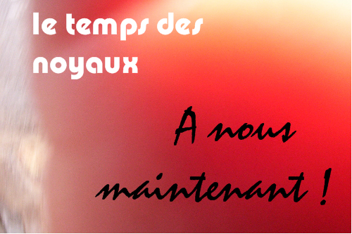 Illustration de l'esprit de mai 68 en France. Création pour sortir de l'inextricable problème du copyright des affiches de l'époque. self made PRA